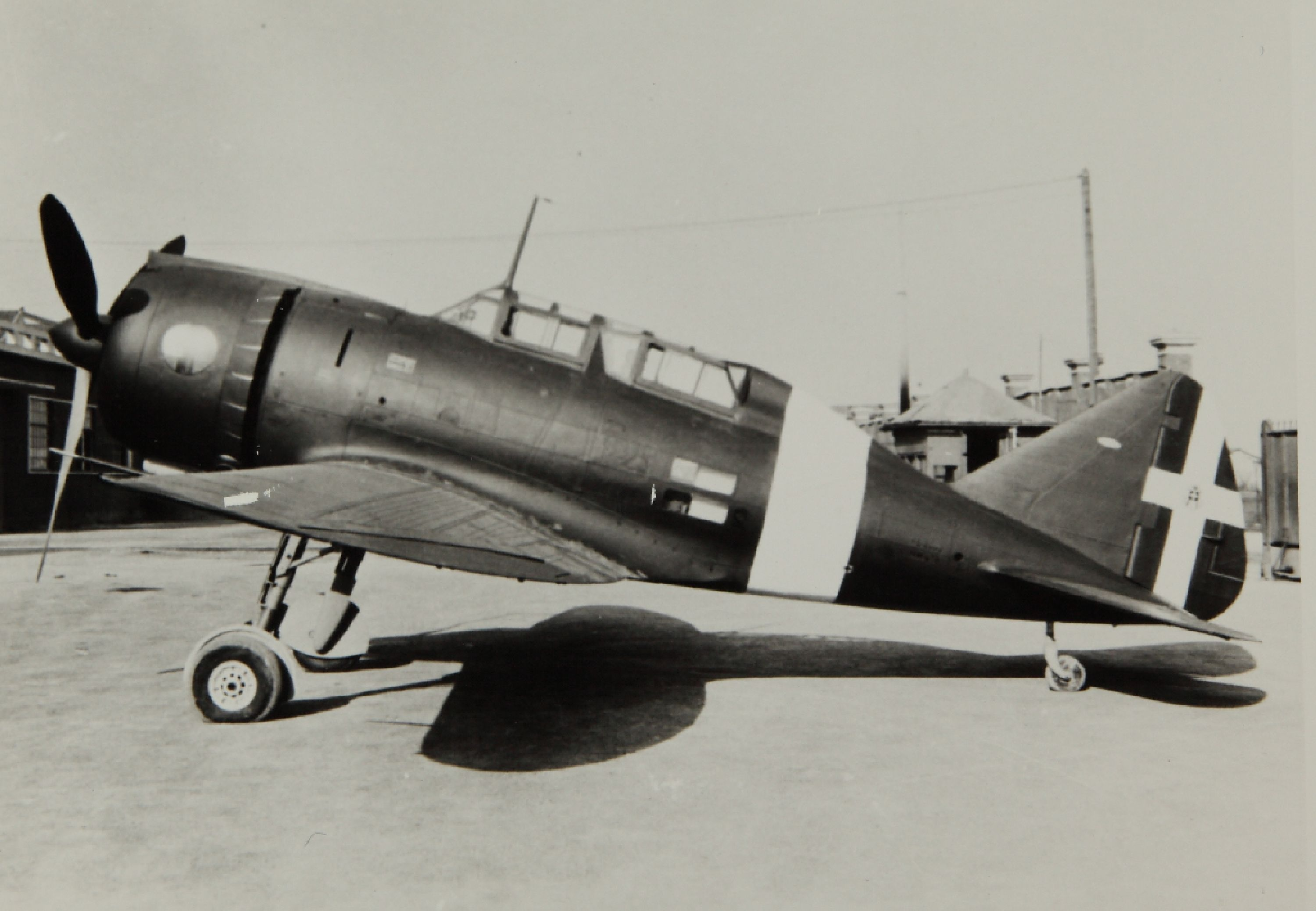 Il prototipo MM.478 del Reggiane Re.2003